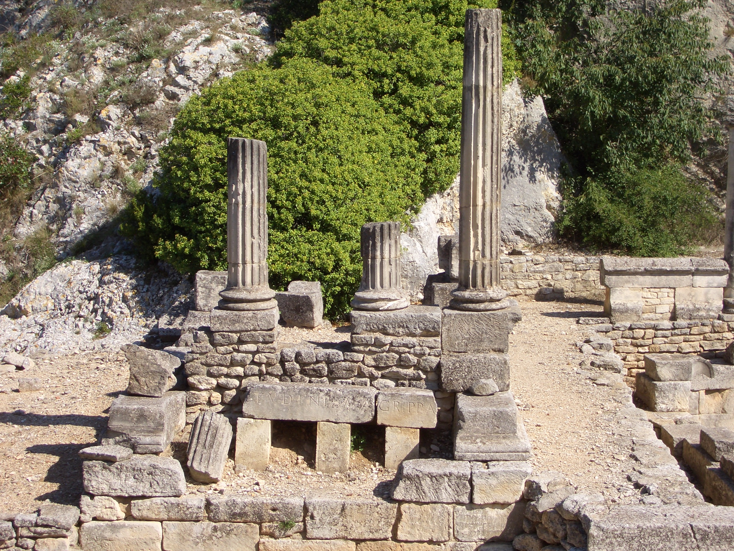 Glanum